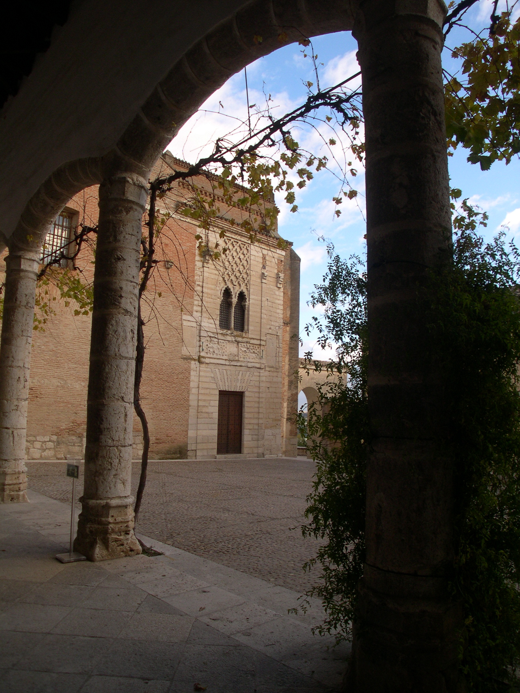 Entrada al real monasterio-palacio de Las Claras, en Tordesillas (Valladolid, España); al fondo la fachada del Palacio Real de Pedro I el Cruel y de Juana de Castilla, llamada la Loca